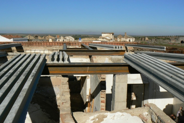 Reabilitación de Las Minas de Santa Marta